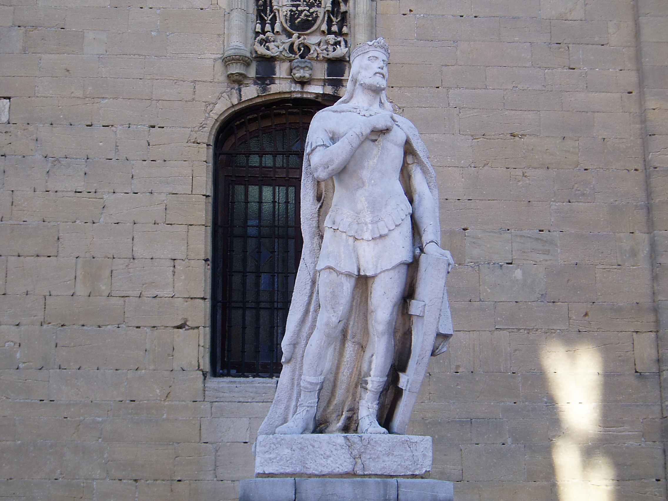 Estatua del rey Alfonso II de Asturias obra de Víctor Hevia. Situada a un lado del pórtico de la Catedral de Oviedo.